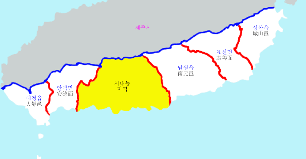 Seogwipo city